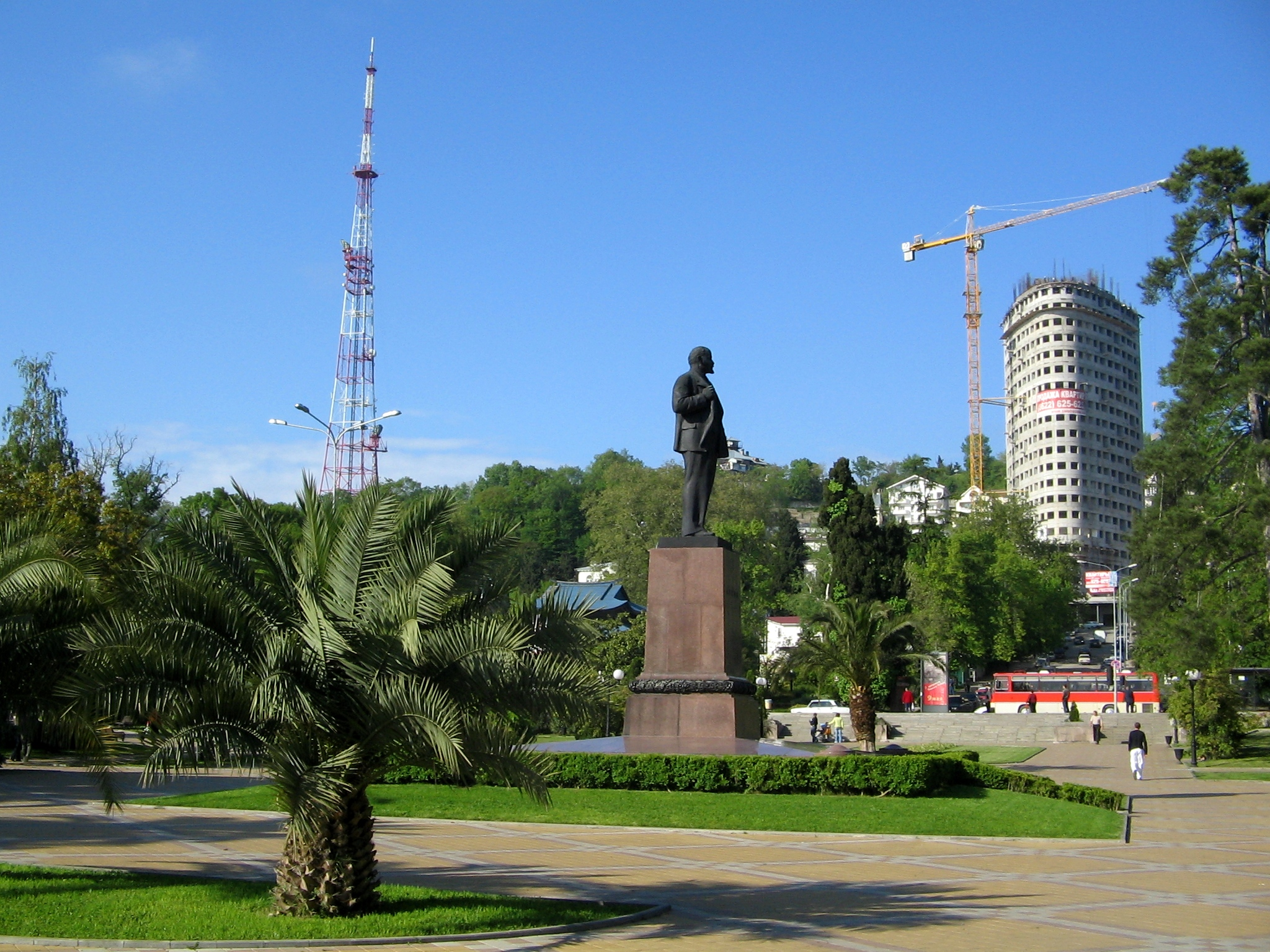 Памятник Ленину в Сочи